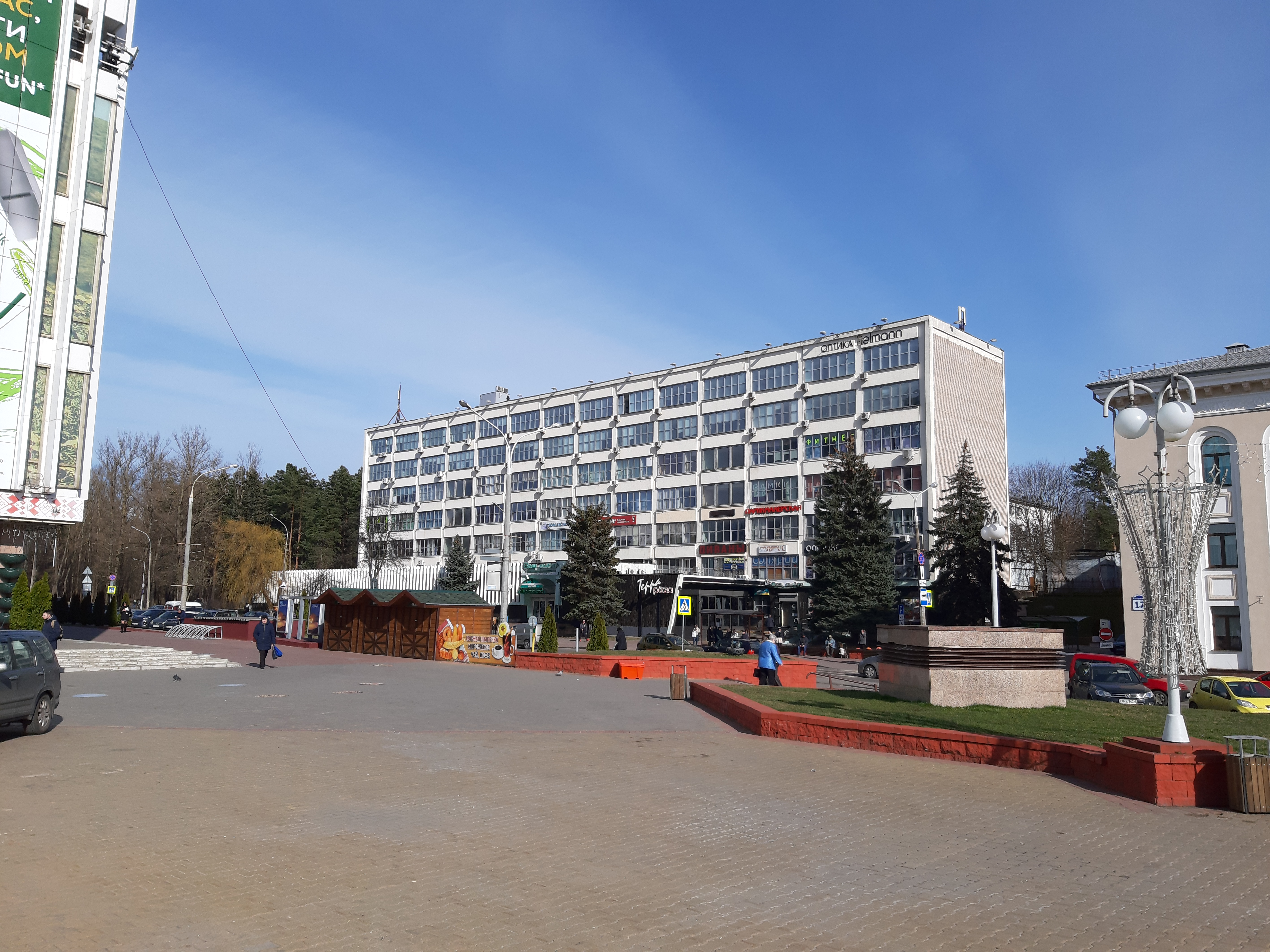 Будынак Інстытута тэхнічнай эстэтыкі